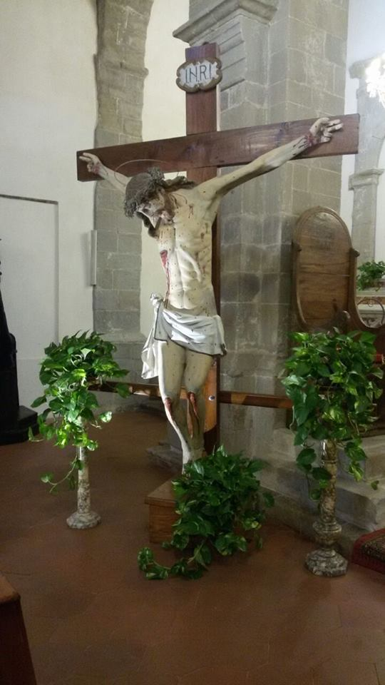 Crocifisso XVII sec